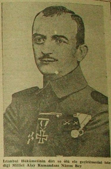 Kategori:Mehmet Nâzım